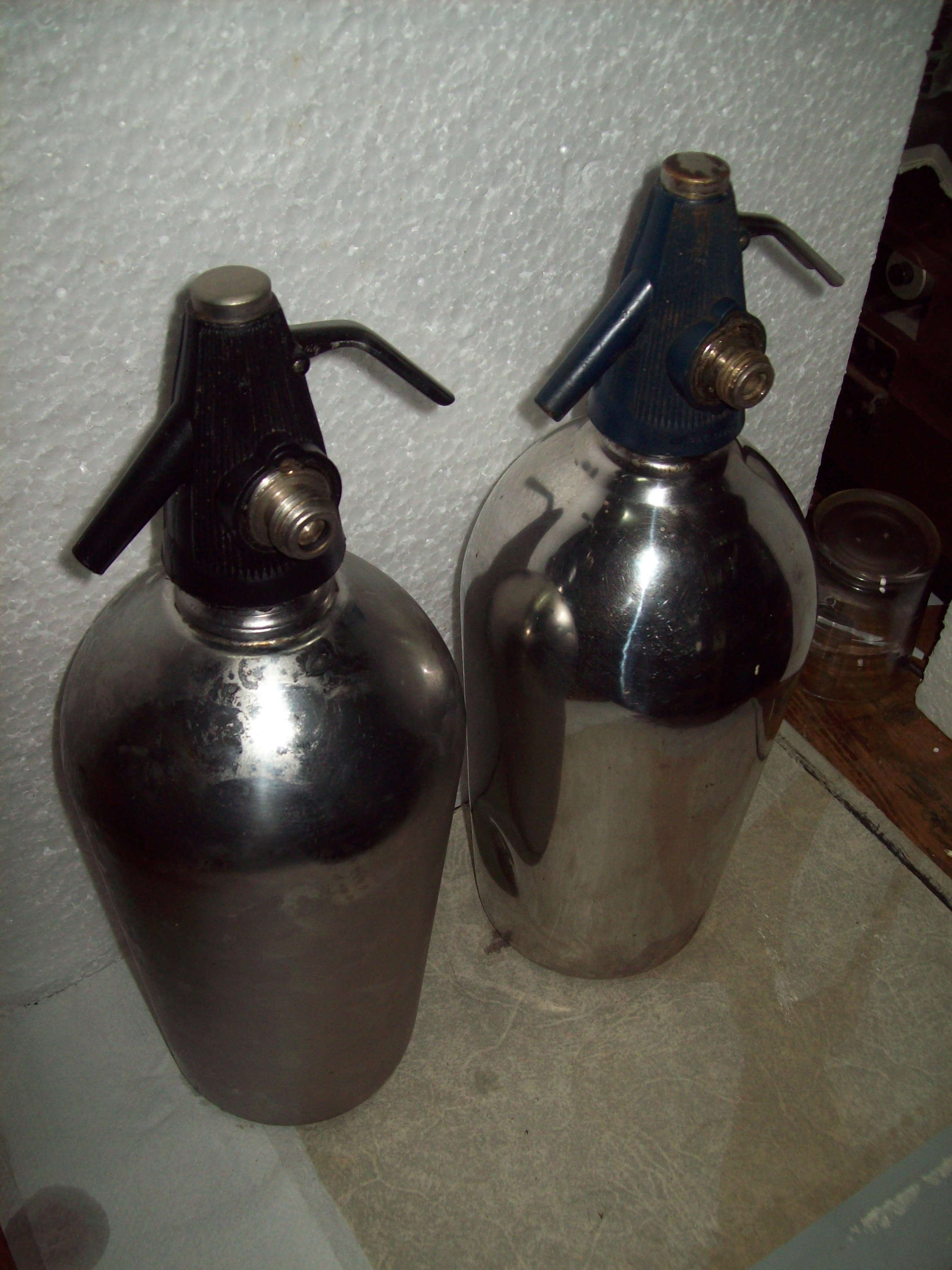 Son los cabesales de dos sifones Drago.